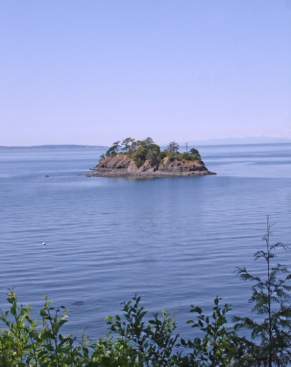 Freeman Island